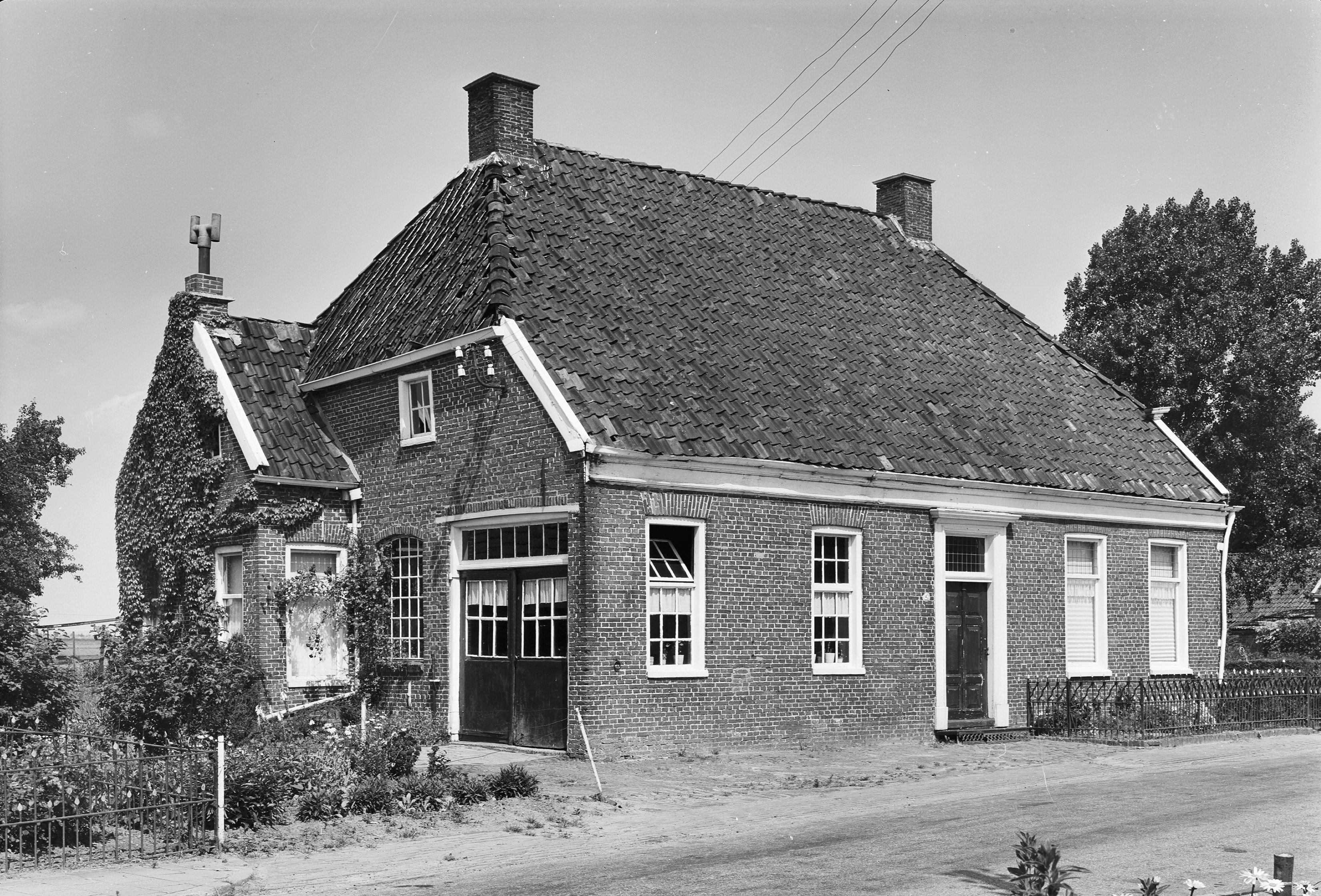 aanzicht voor- en zijgevel